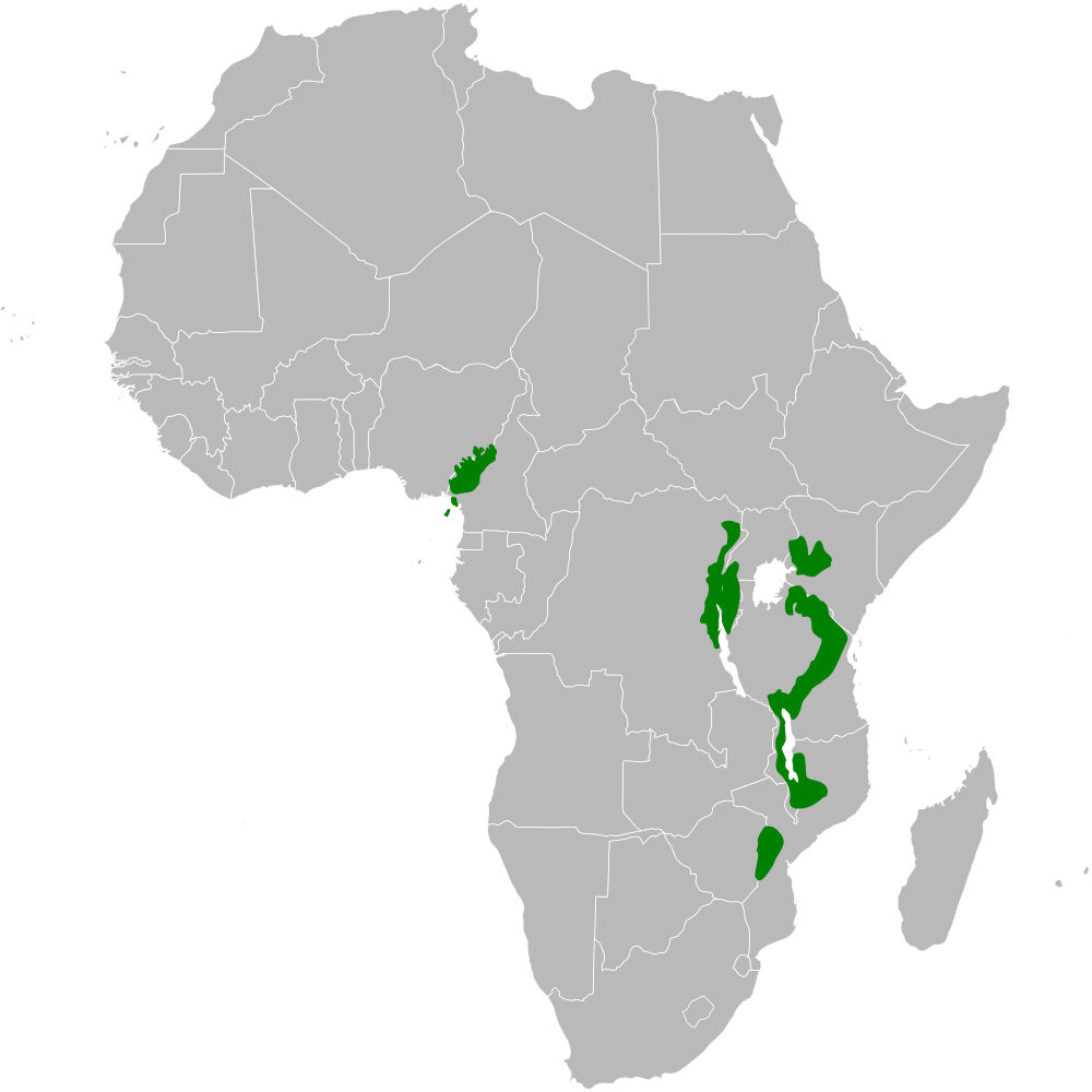 Arizelocichla distribution map